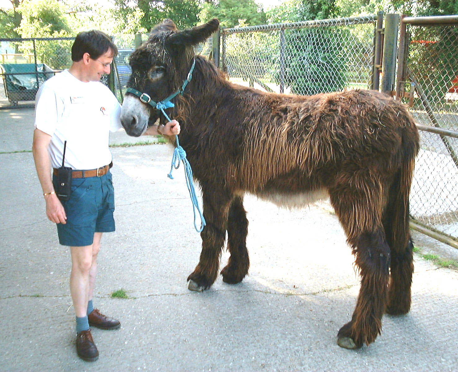 Poitou Donkey or Baudet du Poitou.